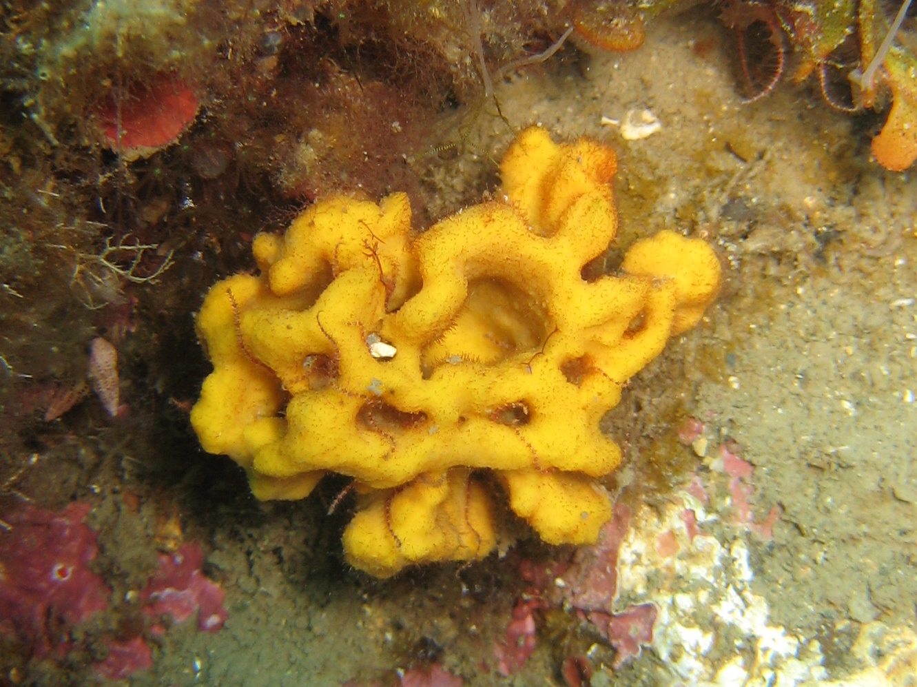 Axinelle plate (Axinella damicornis) en Méditerranée près de Banyuls